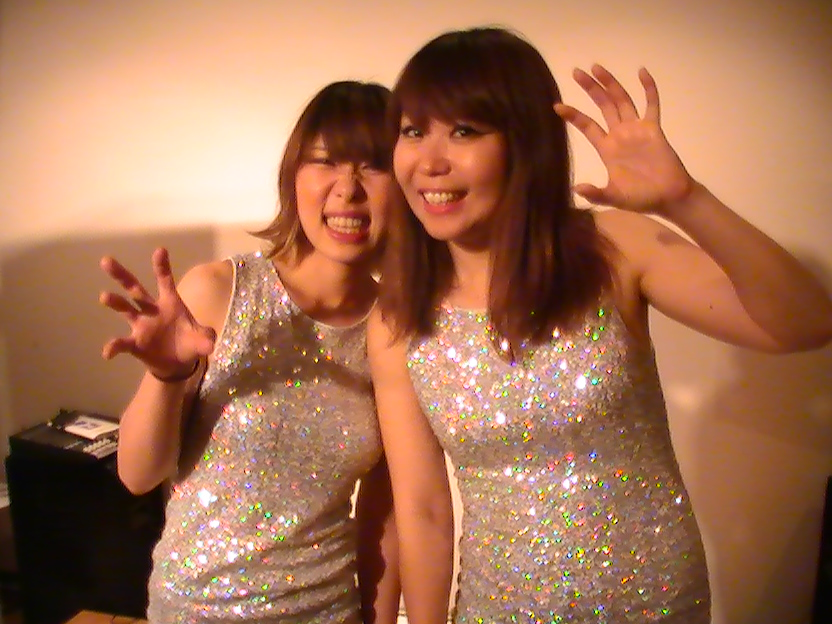 コブラナッツ (2013年6月)